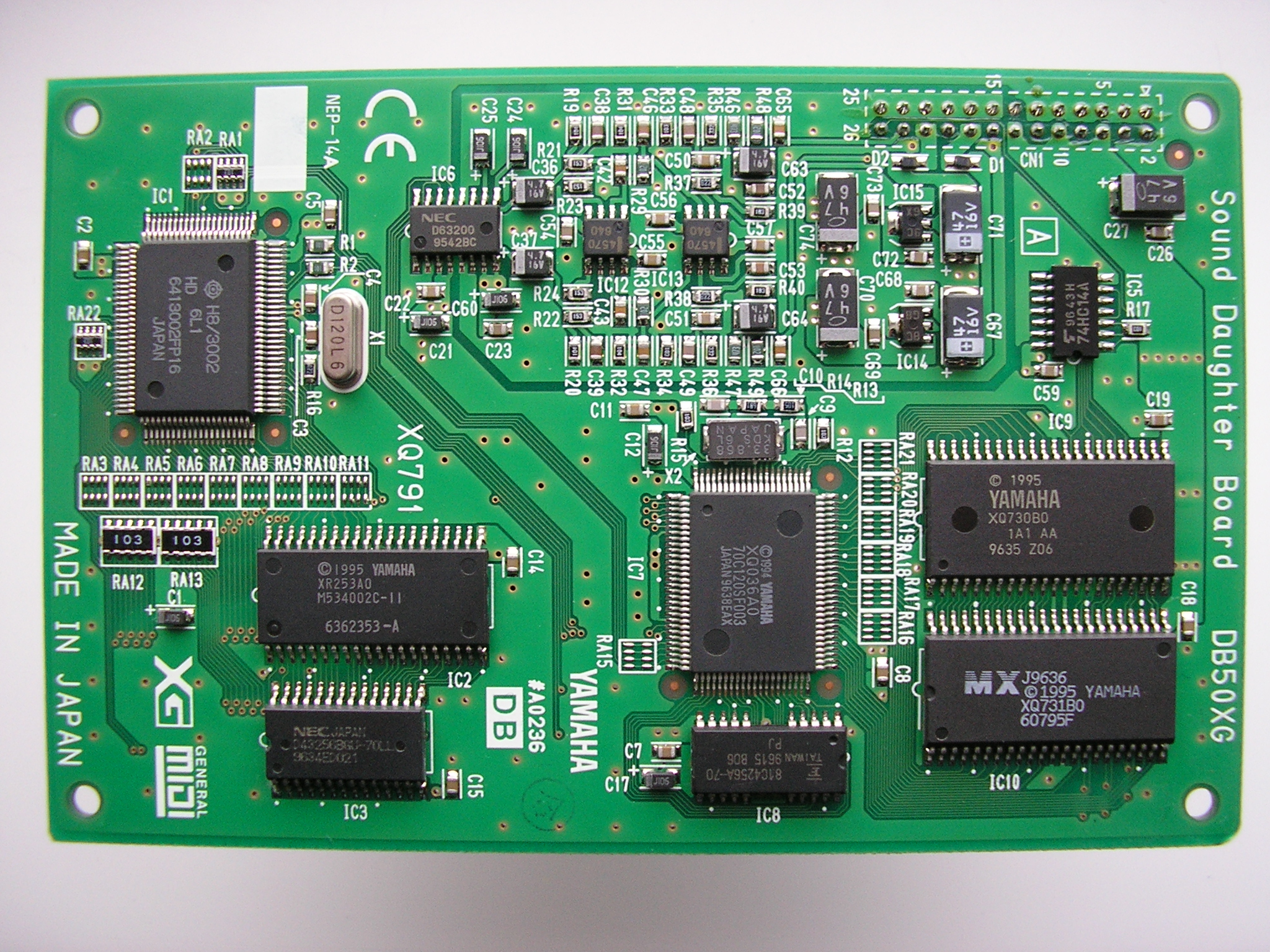 Yamaha DB50XG daughterboard General MIDI Yamaha XG 4MB wave ROM 737 voices 1995